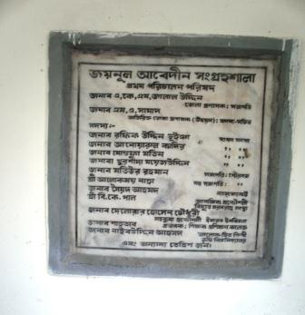 প্রথম পরিচালনা পরিষদের নাম সম্বলিত ফলক৤